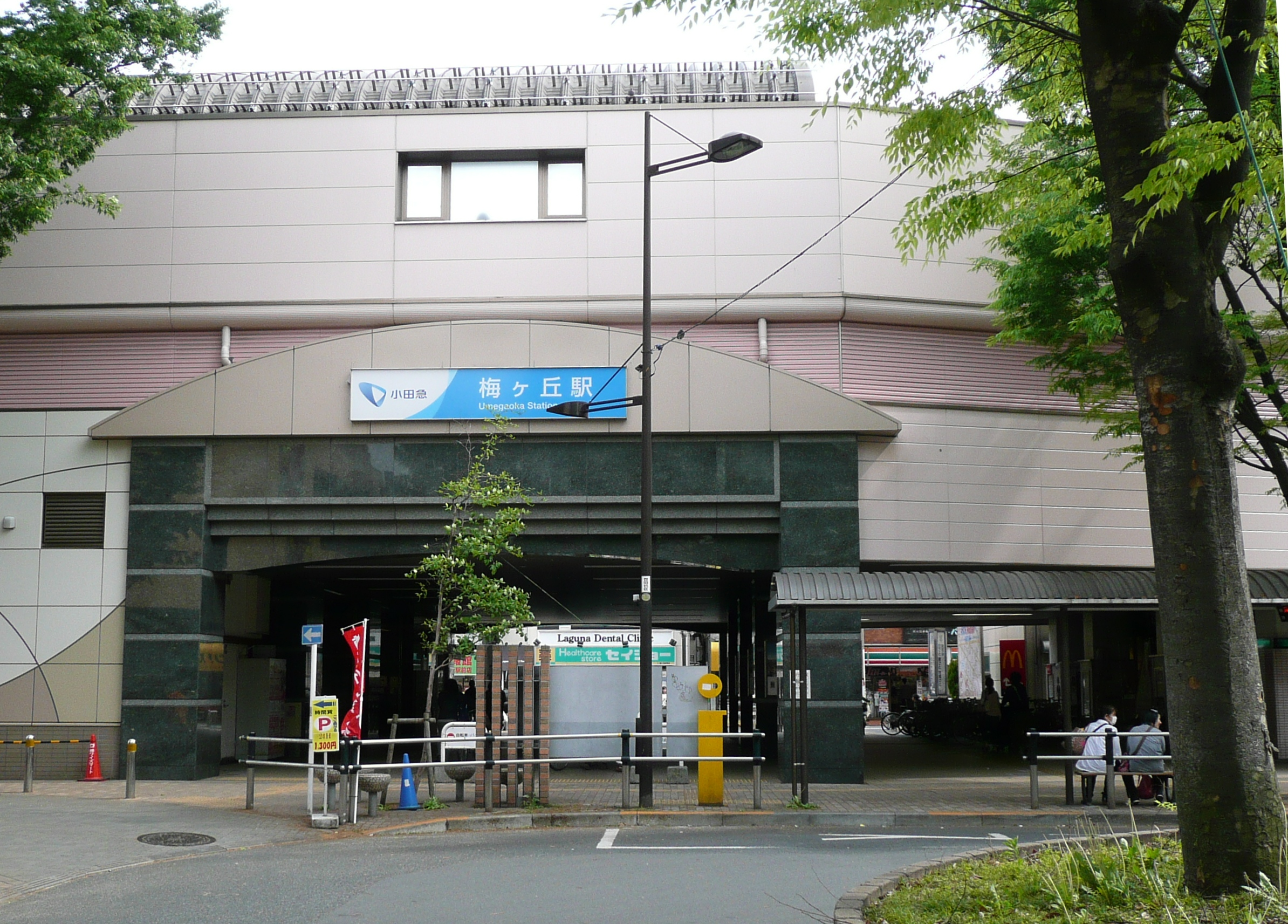 梅ヶ丘駅北口